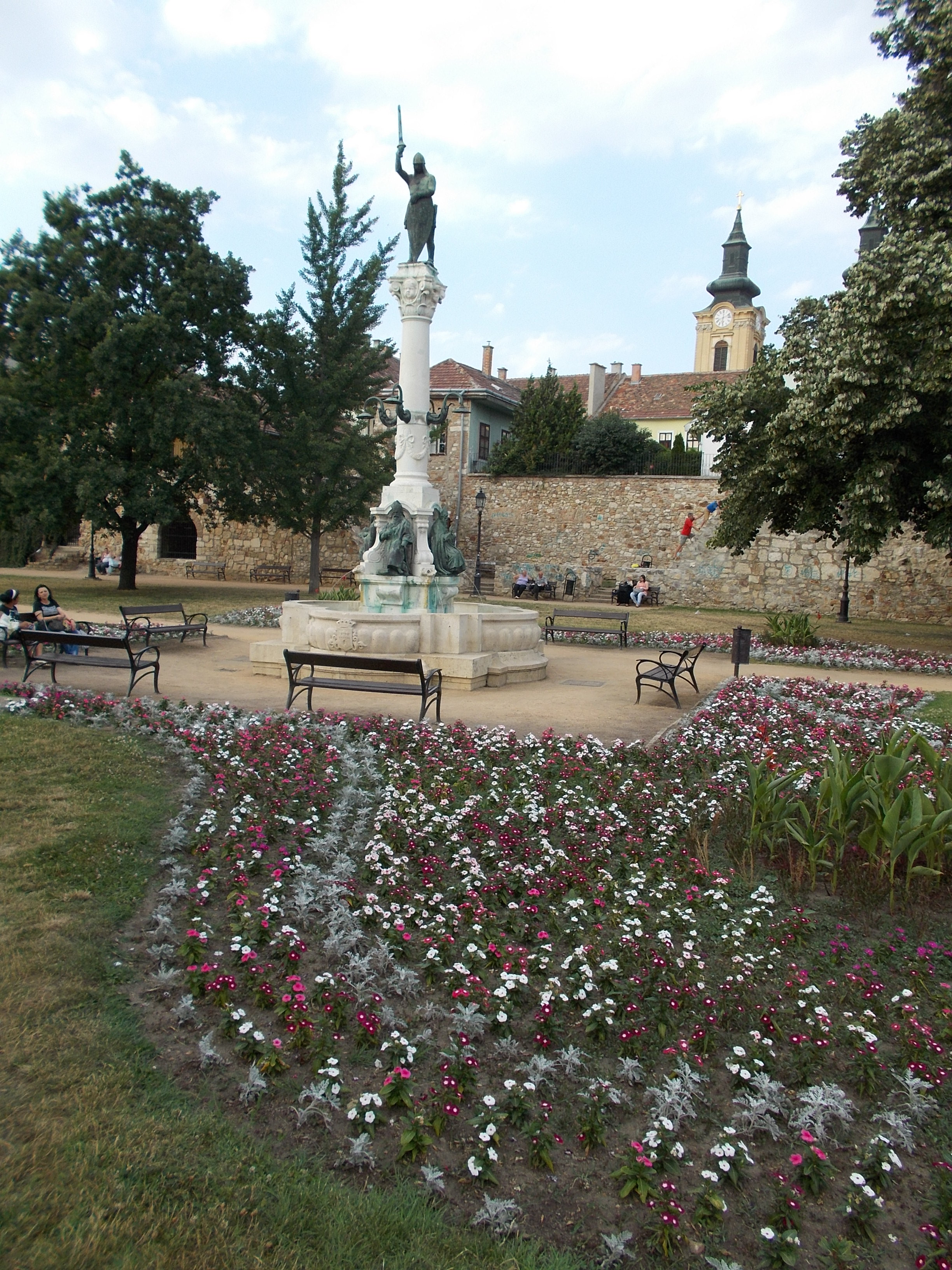 Püspök-kút. (Bory Jenő műve, 1972, eredetileg: 1928). mögötte Várfal ID 3911 és a Székesegyház tornya ID 3806. - Magyarország, Fejér megye, Székesfehérvár, Belváros, Piac tér, Várfal Park This is a photo of a monument in Hungary. Identifier: 3911 This is a photo of a monument in Hungary. Identifier: 3806